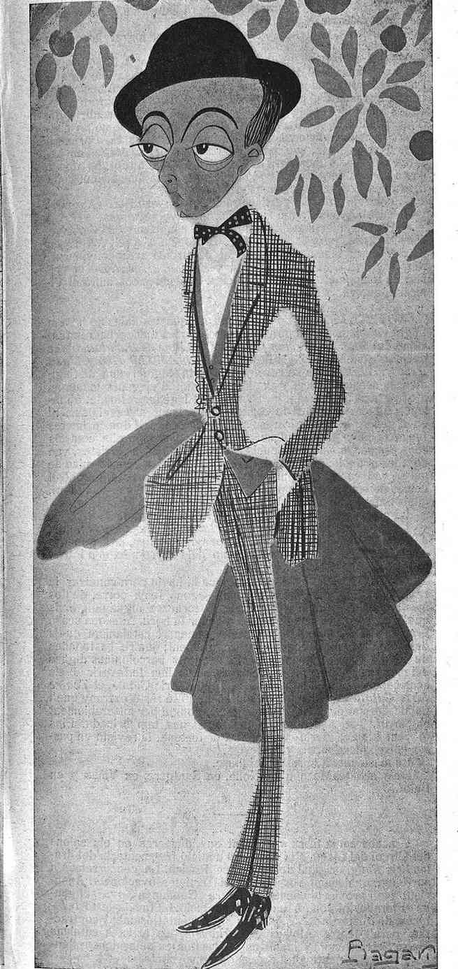 Exposició de caricatures d'en Bagaria.